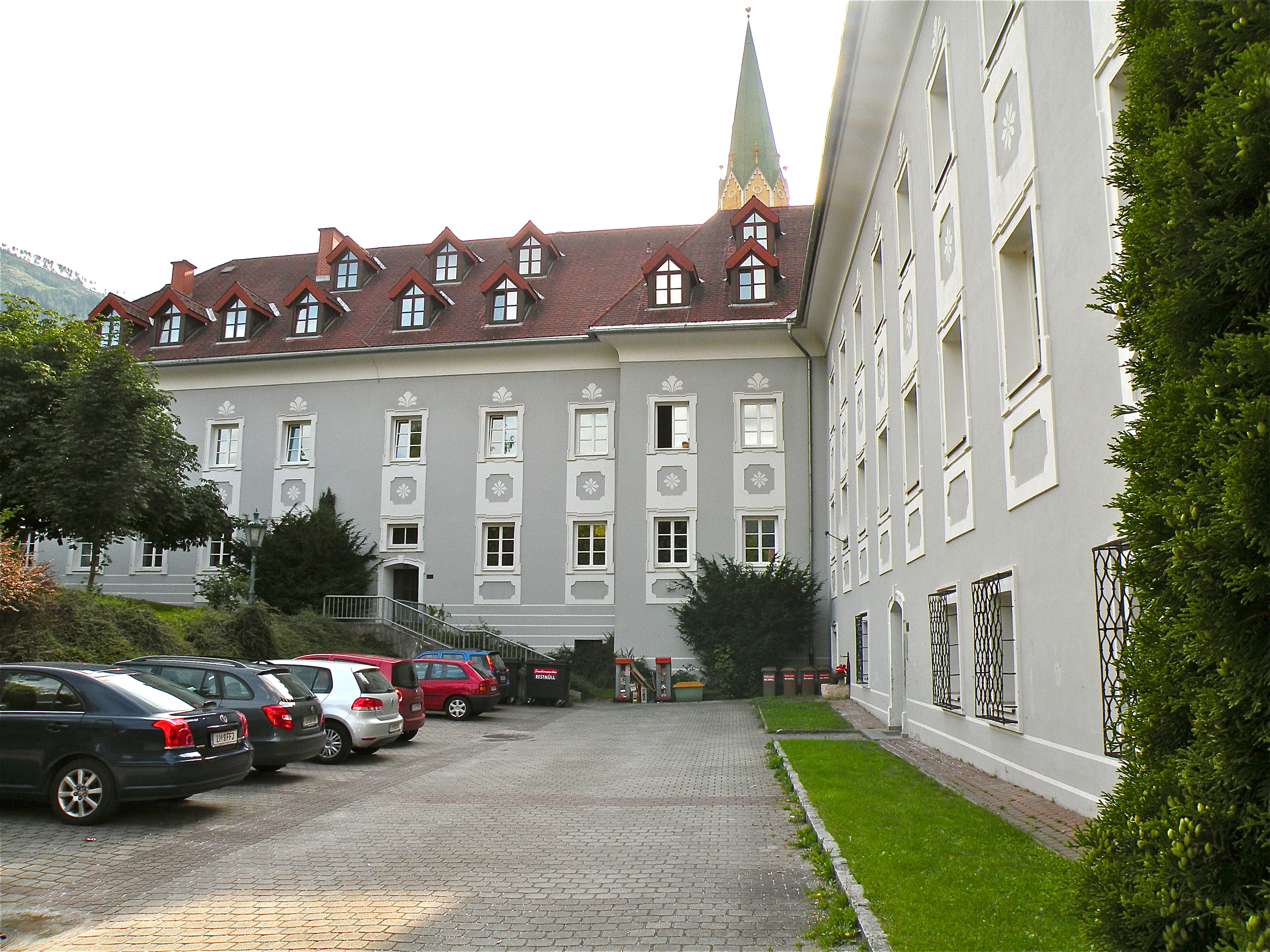 Ehemaliges Augustinerchorherrenstift in Rottenmann im Bezirk Liezen in der Steiermark